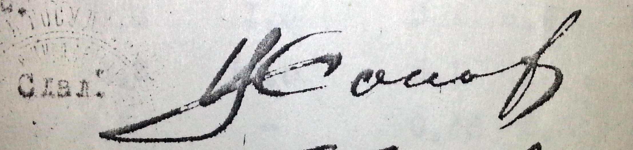 Подпись Соковнина В.А. о сдаче дел и обязанностей на Акте 16 июня 1936 г.